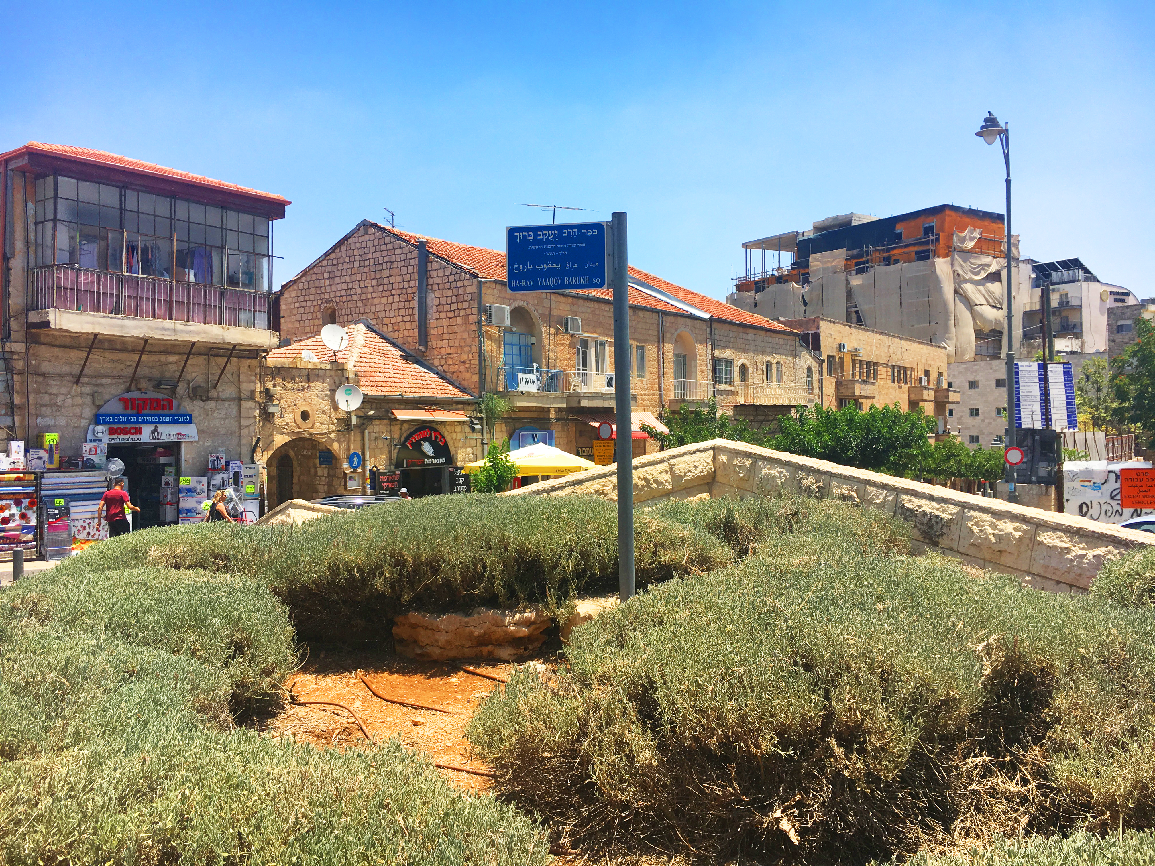 כיכר הרב יעקב ברוך, בסמוך לשכונת נחלאות